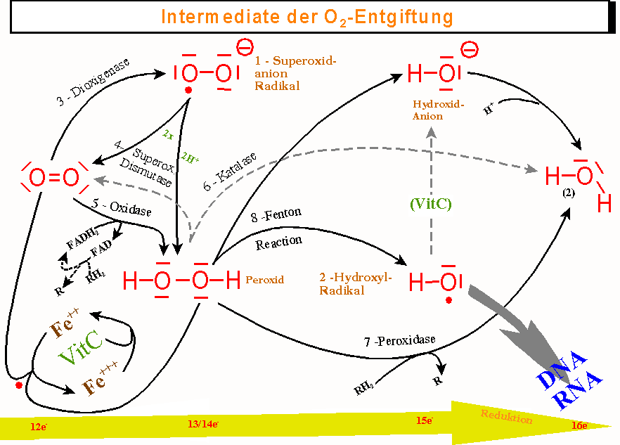 Oxidative stress